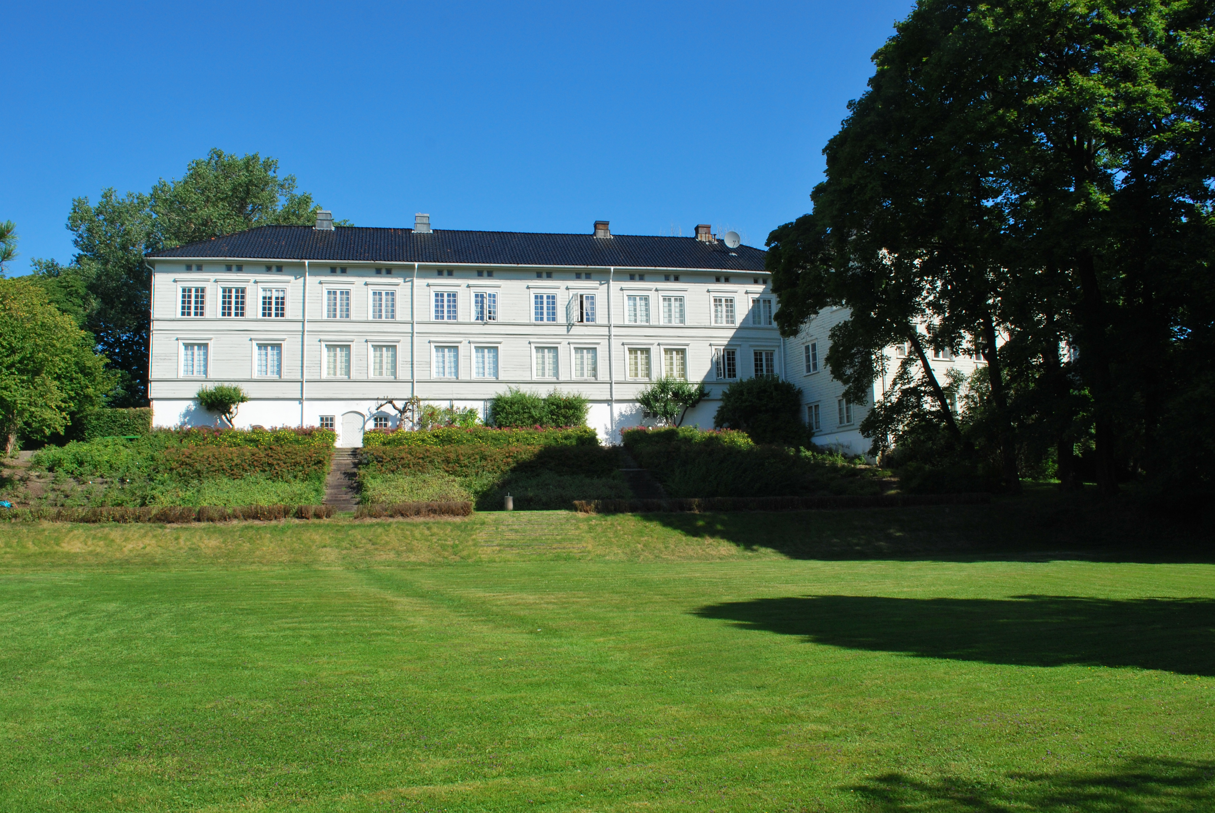 Linderud gård, hovedbygningen sett fra syd med hagen foran